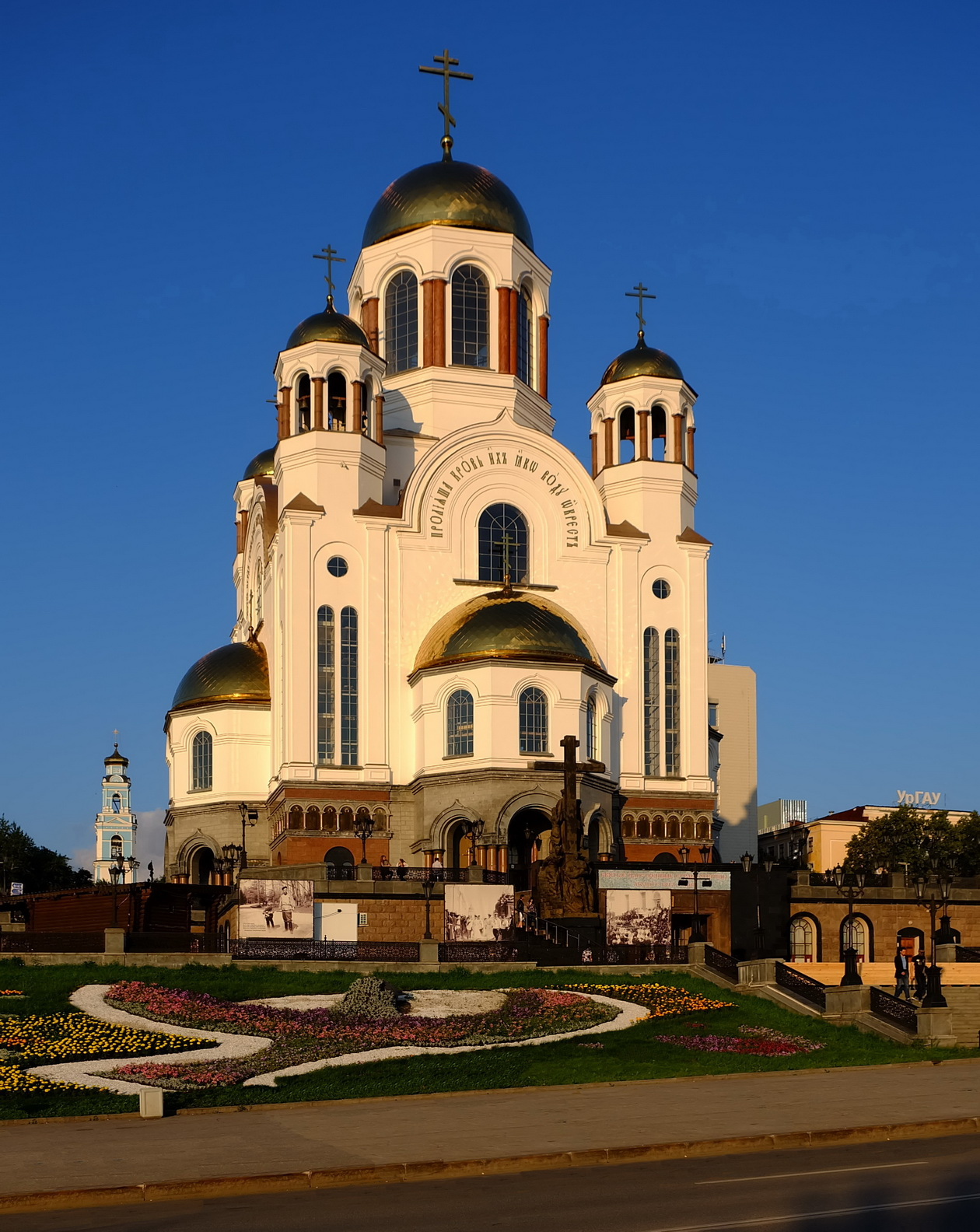 Храм-на-крови в Екатеринбурге